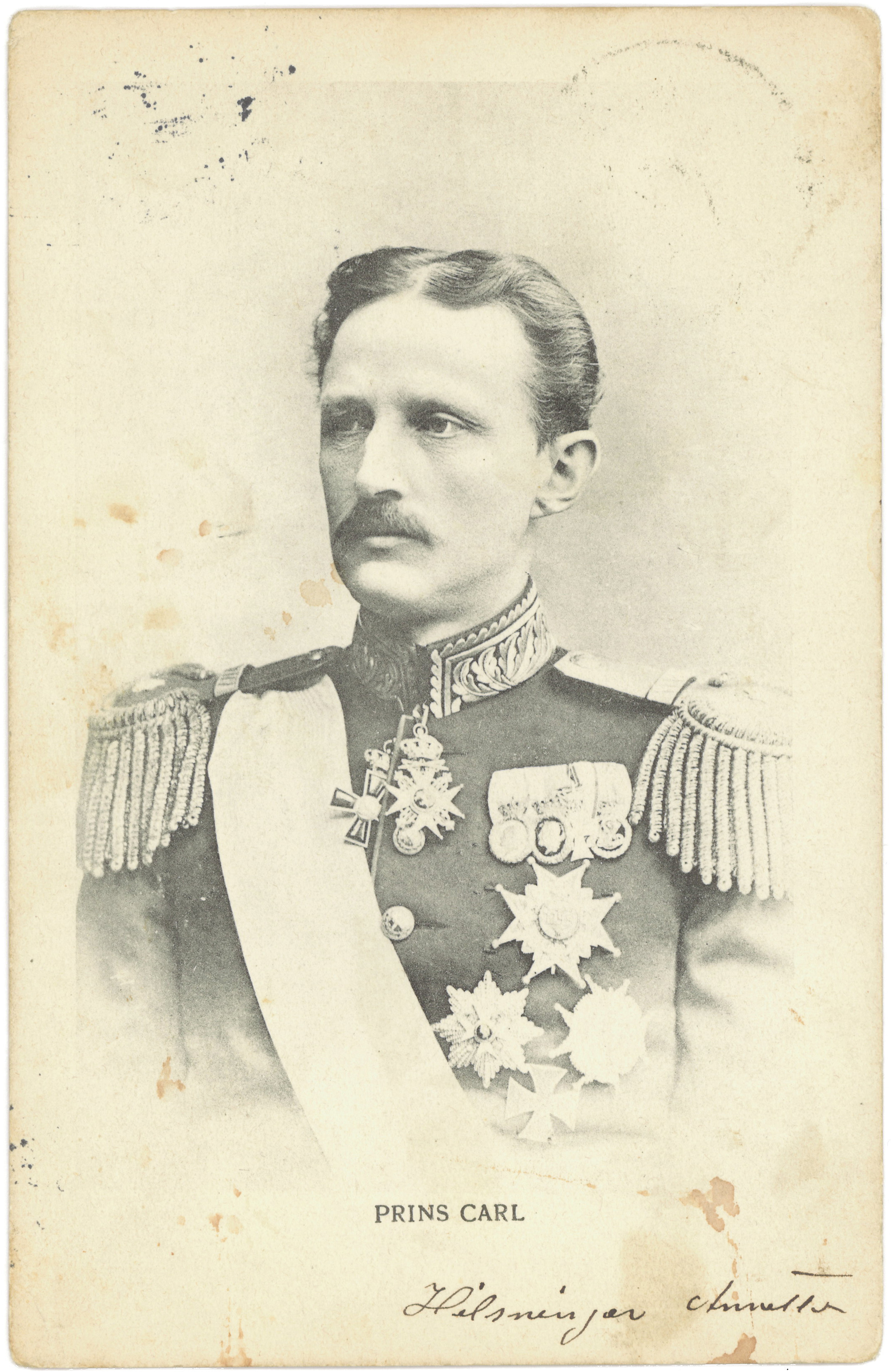 Postkort poststemplet Stockholm 14 September 1905.